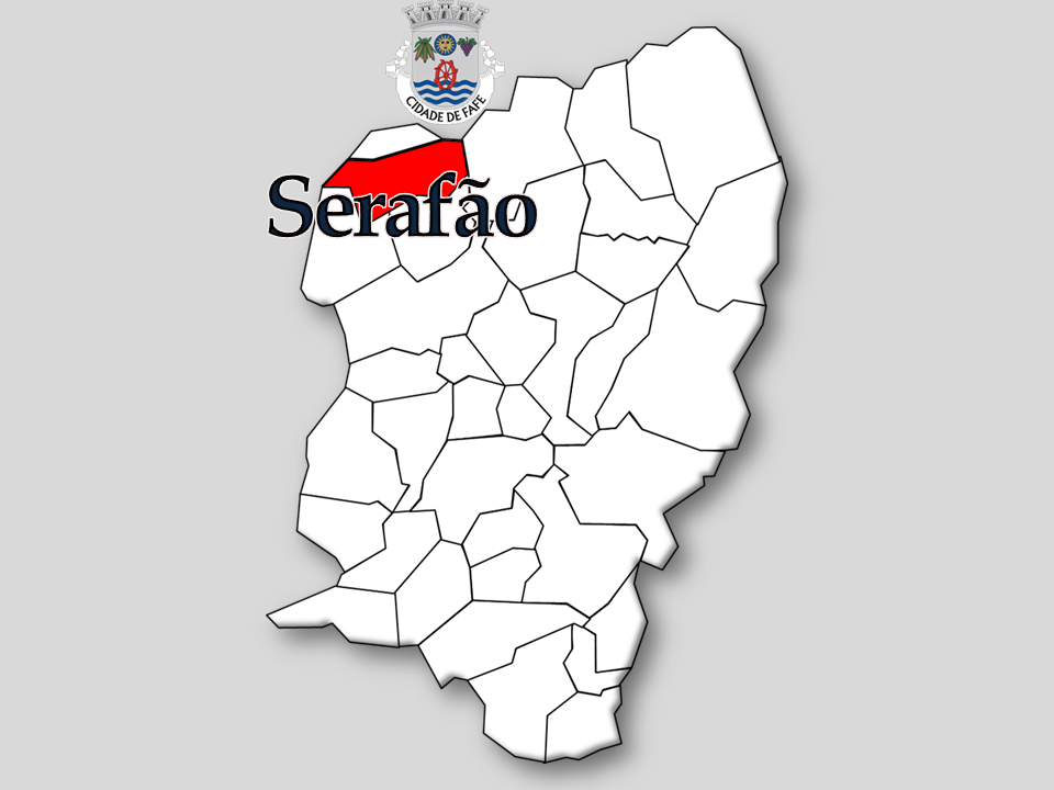 Censos 1864/2011